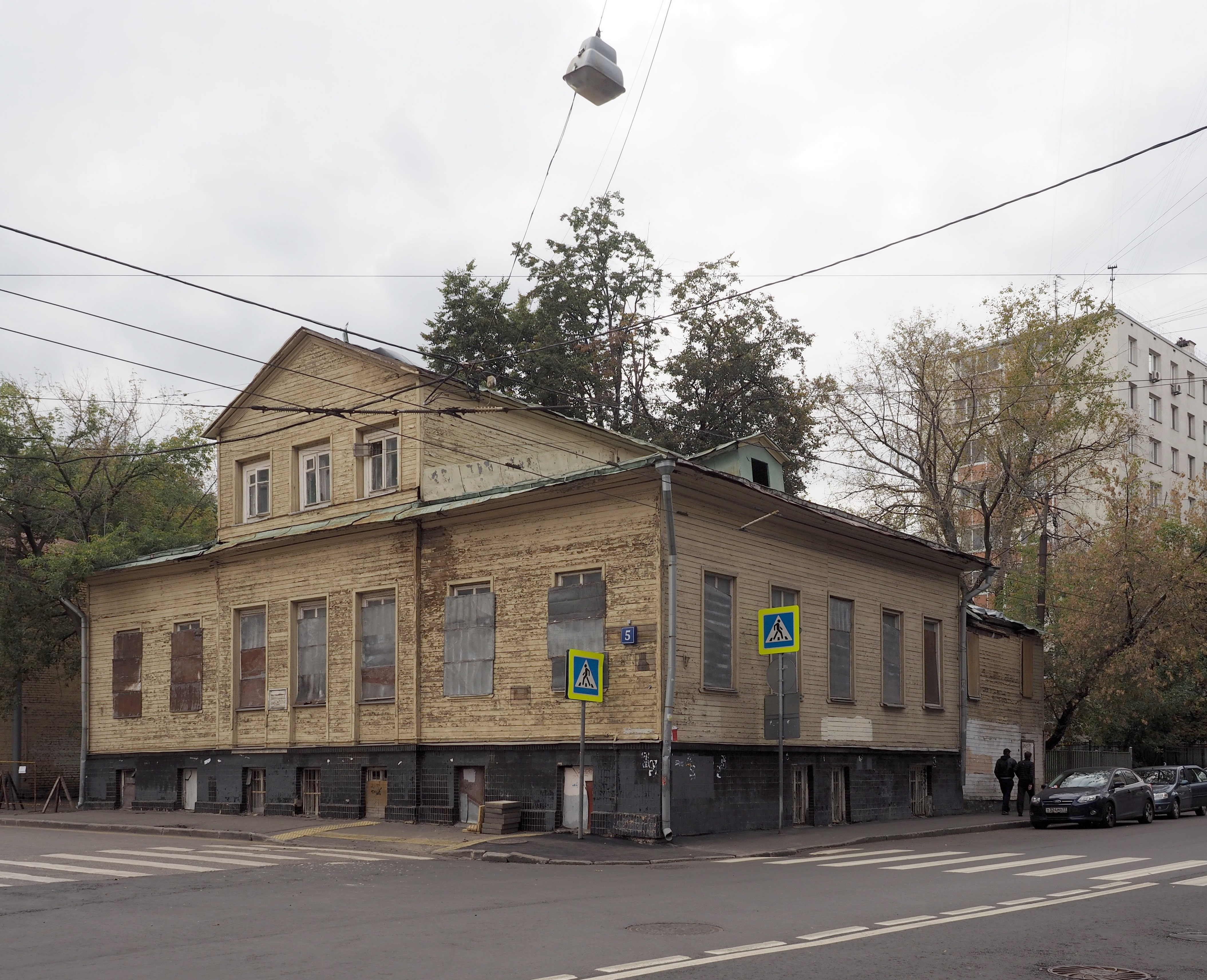 Жилой дом: Елоховский пр., дом 5, Басманный, Центральный округ, Москва